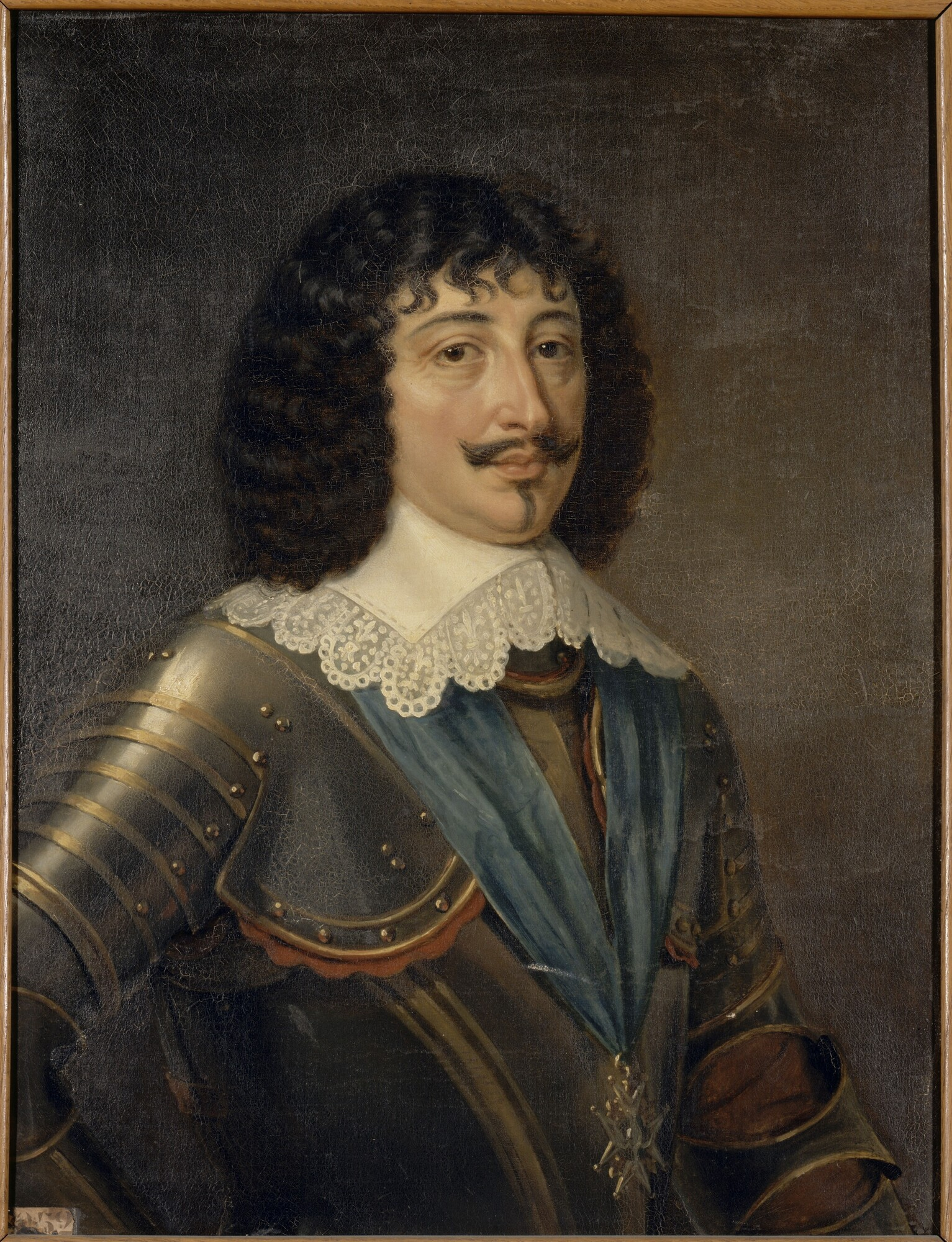 Commandé par Louis-Philippe pour le musée historique de Versailles en 1835